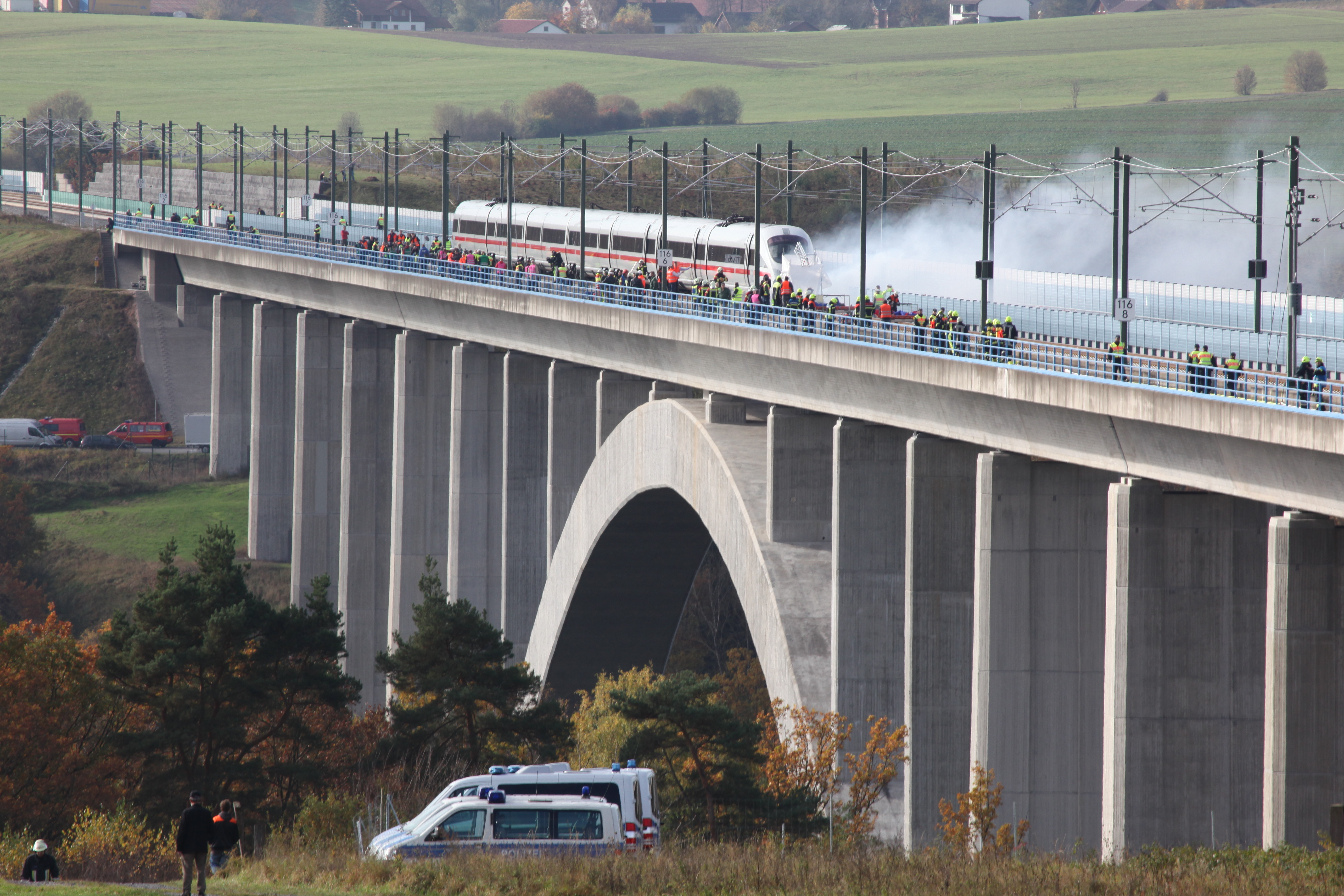 Talbrücke Froschgrundsee, Rettungsübung